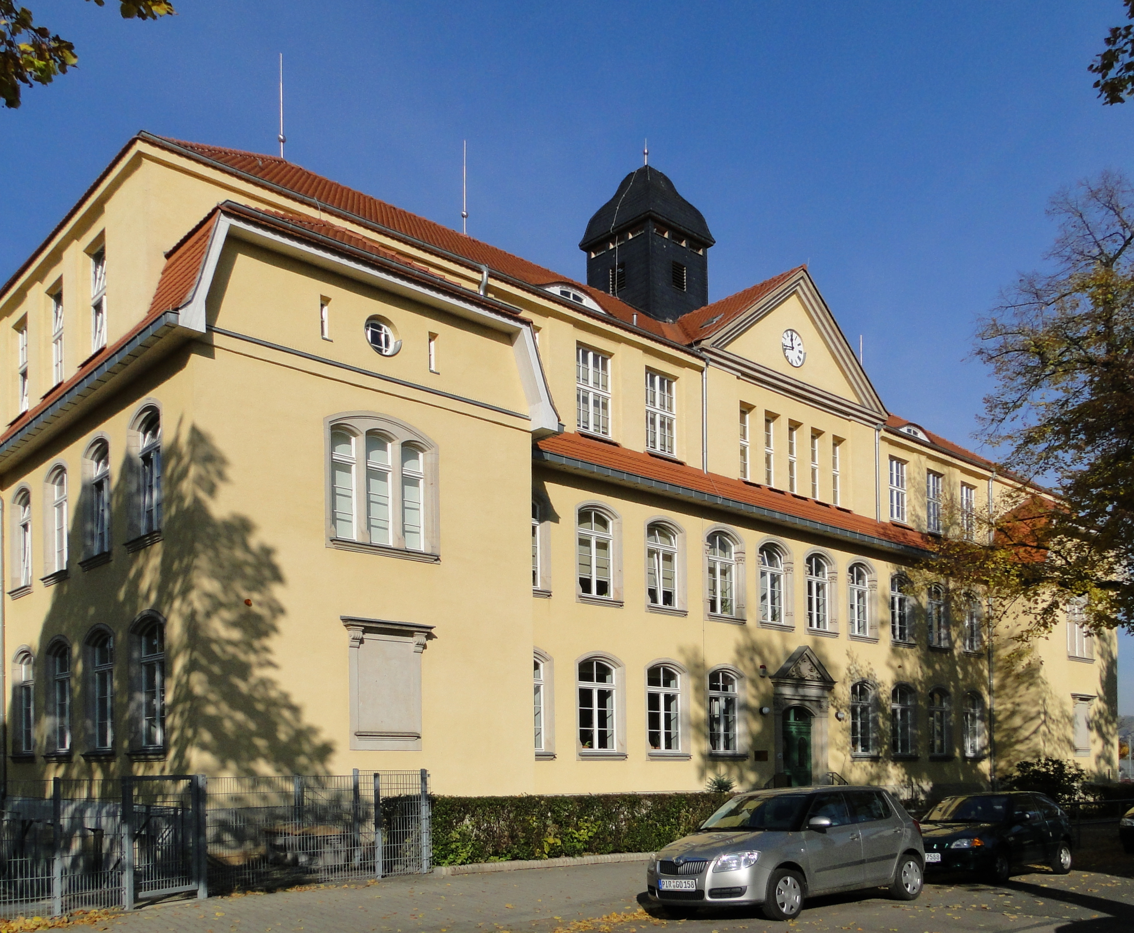 Die 66. Grund- und Mittelschule Dresden-Leuben auf der Dieselstraße